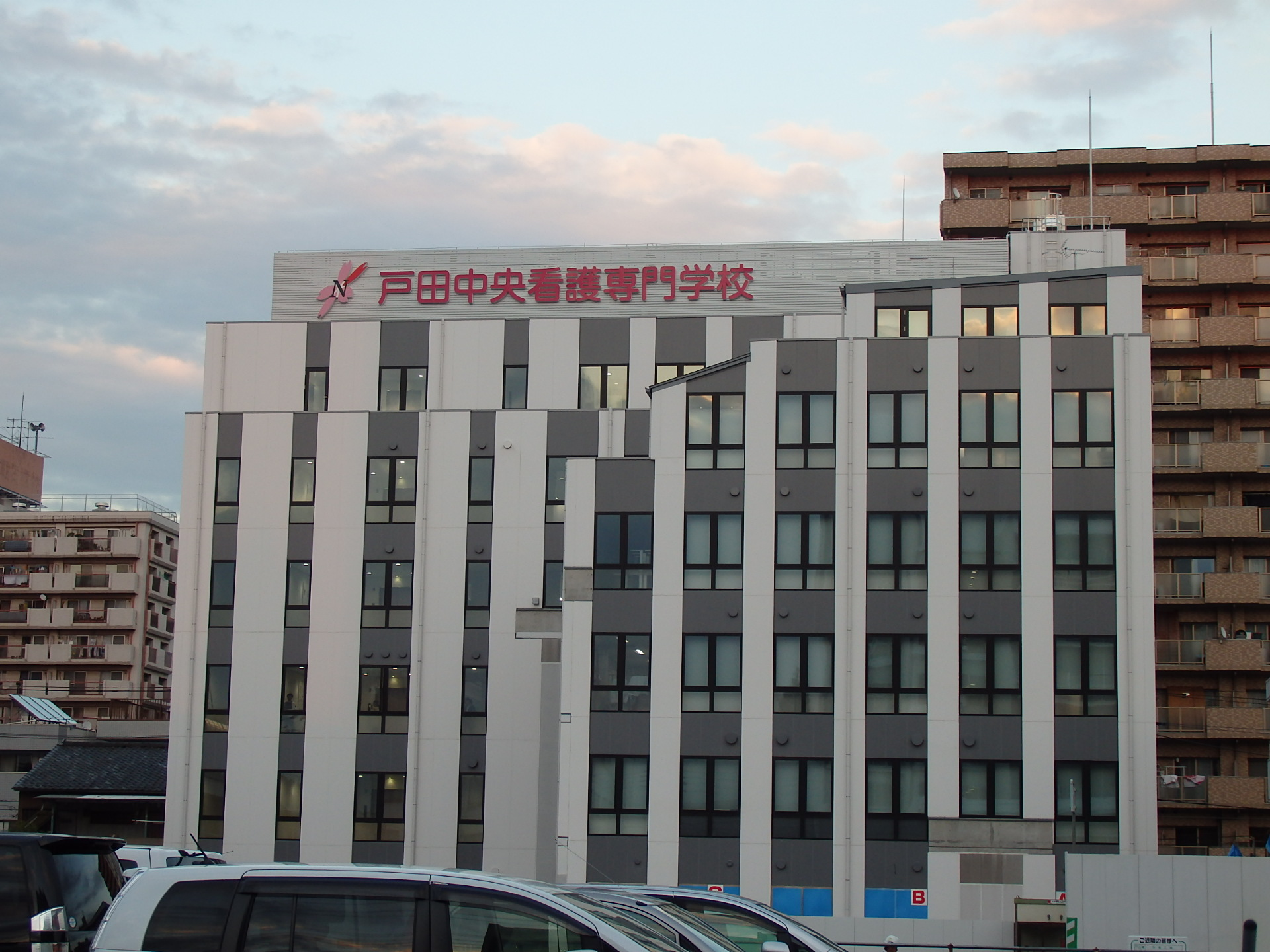 戸田中央看護専門学校